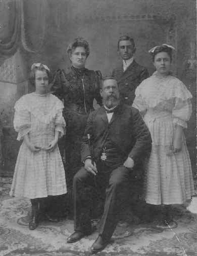 El presidente ecuatoriano Emilio Estrada Carmona, su esposa María Victoria Pía Sciacaluga Aubert, y los hijos de ambos.